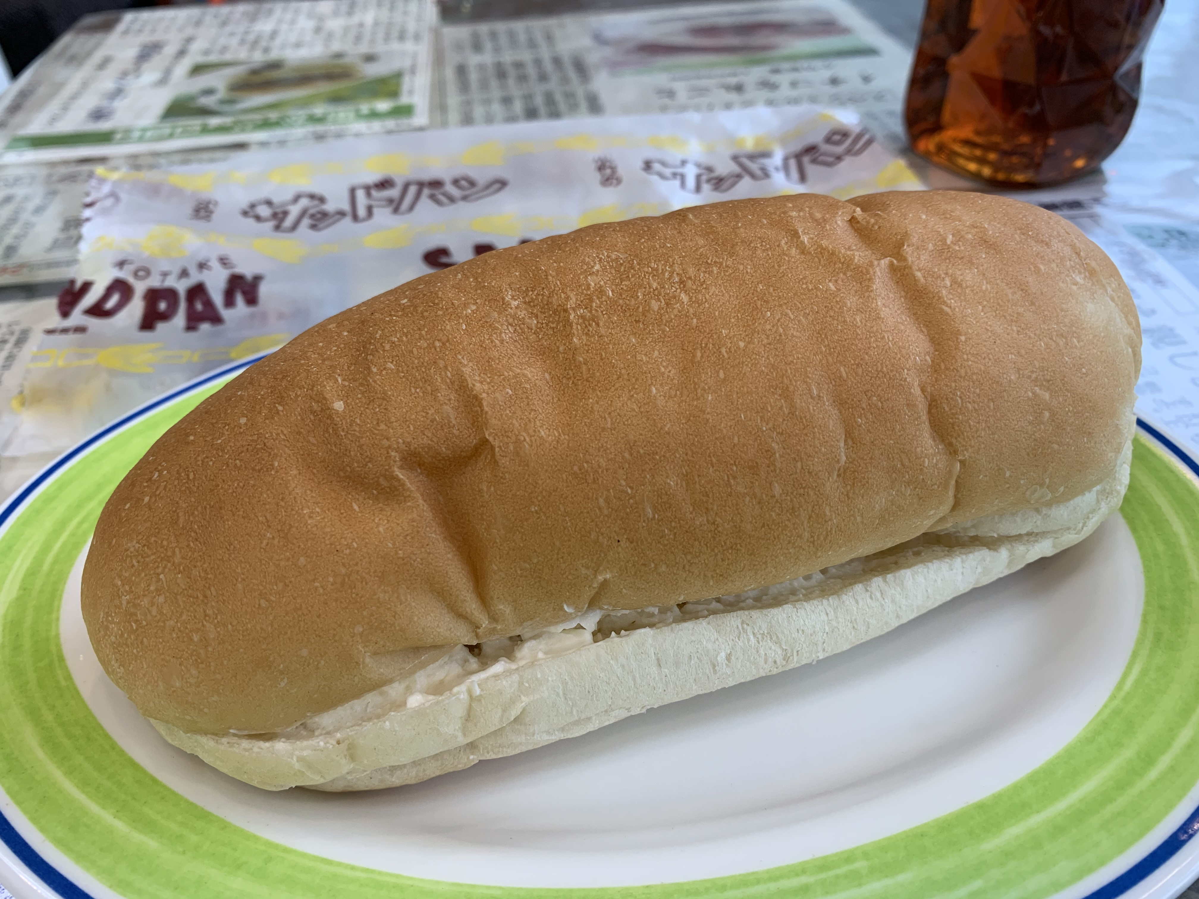 新潟県上越市にある小竹製菓のサンドパン